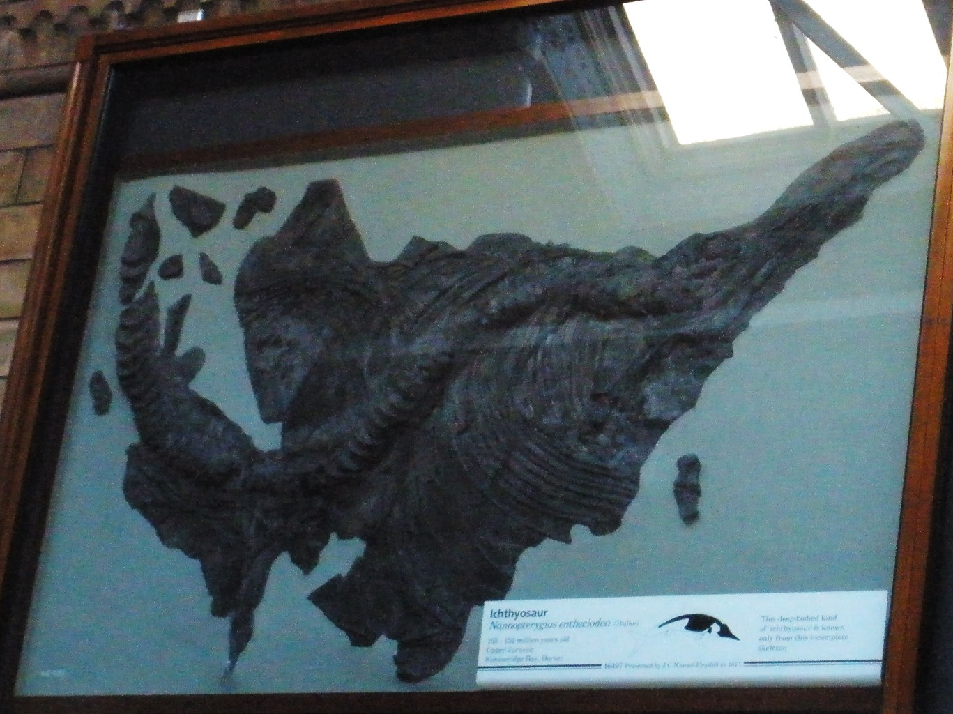 Fossil of Nannopterygius, an extinct reptile-- Took the photo at Natural History Museum, London